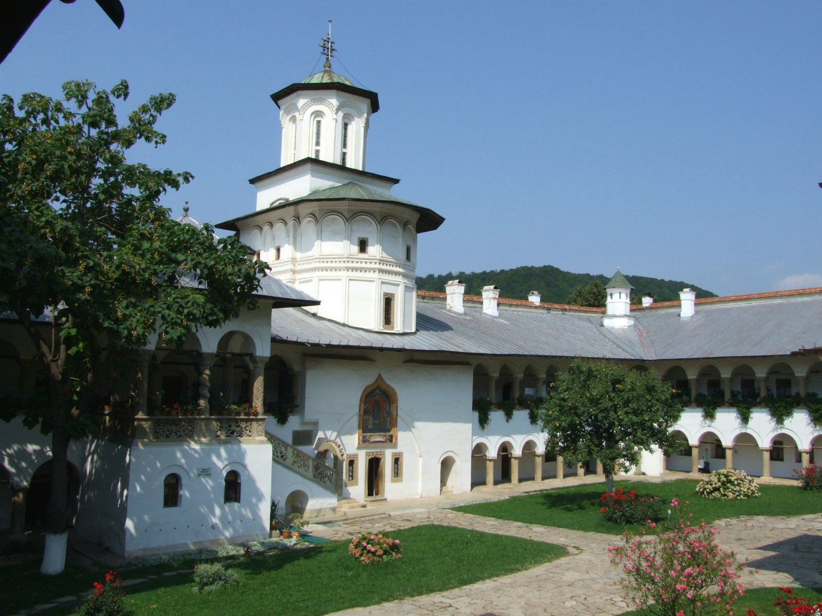 Mănăstirea Horezu